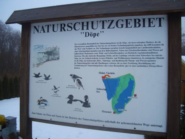 Informationstafel NSG Döpe